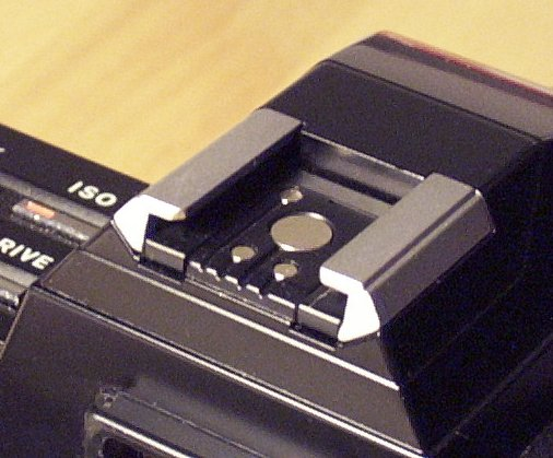 Blitzschuh der Minolta 7000 Sonstiges: sollte Verbesserung gegenüber Image:EOS_305D_Hot-Shoe.jpg sein